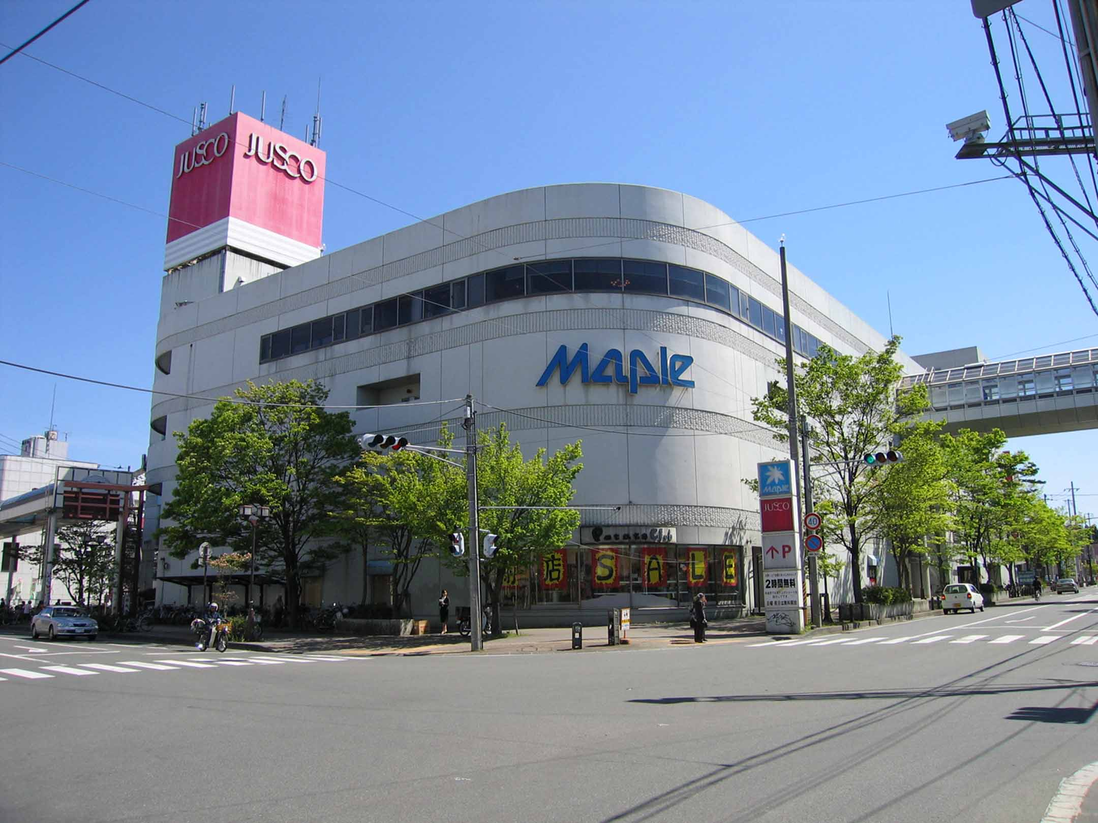 2005年、ジャスコ撤退前のメイプル